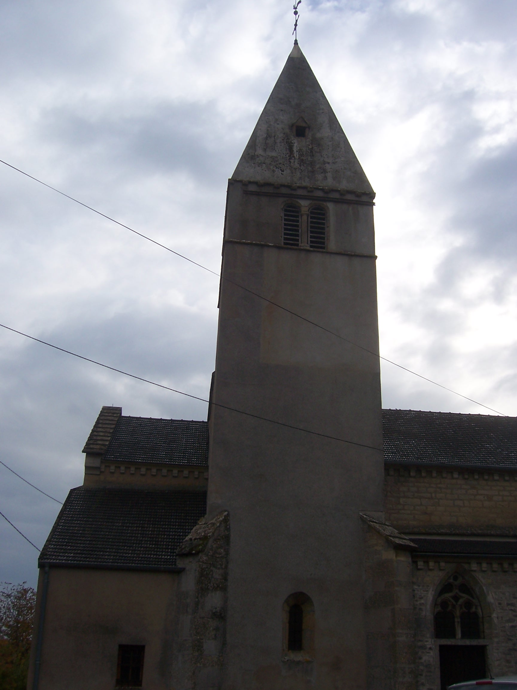 Eglise de Marcilly-lès-Buxy